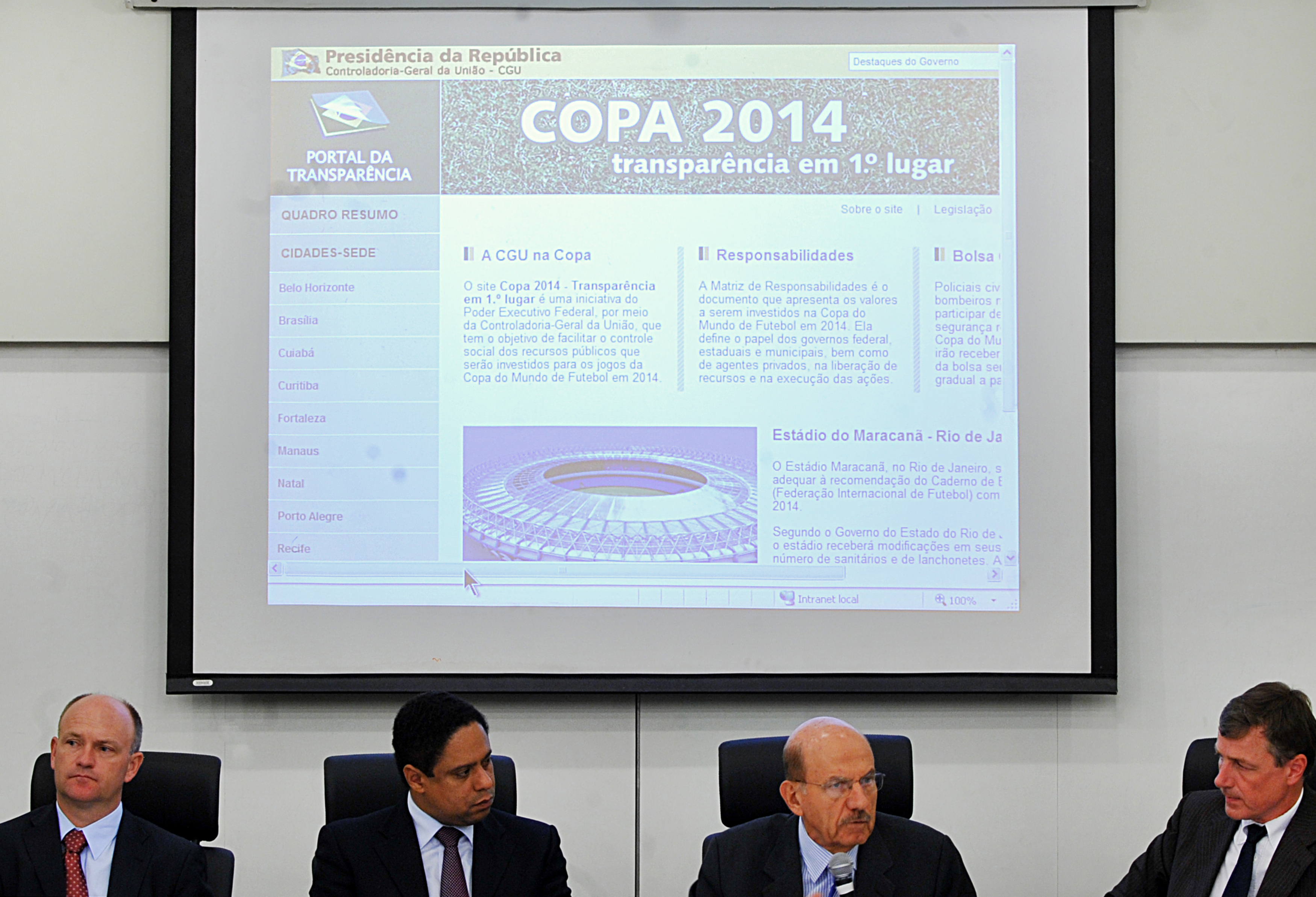 Brasília - O ministro do Esporte, Orlando Silva, o ministro-chefe da Controladoria-Geral da União (CGU), Jorge Hage, e Vincent Defourny, representante da Unesco no Brasil, durante lançamento dos portais Copa 2014 e Jogos Rio 2016, que serão complementares ao Portal da Transparência e permitirão aos brasileiros conhecerem como serão investidos os recursos públicos para a realização dos dois eventos esportivos.